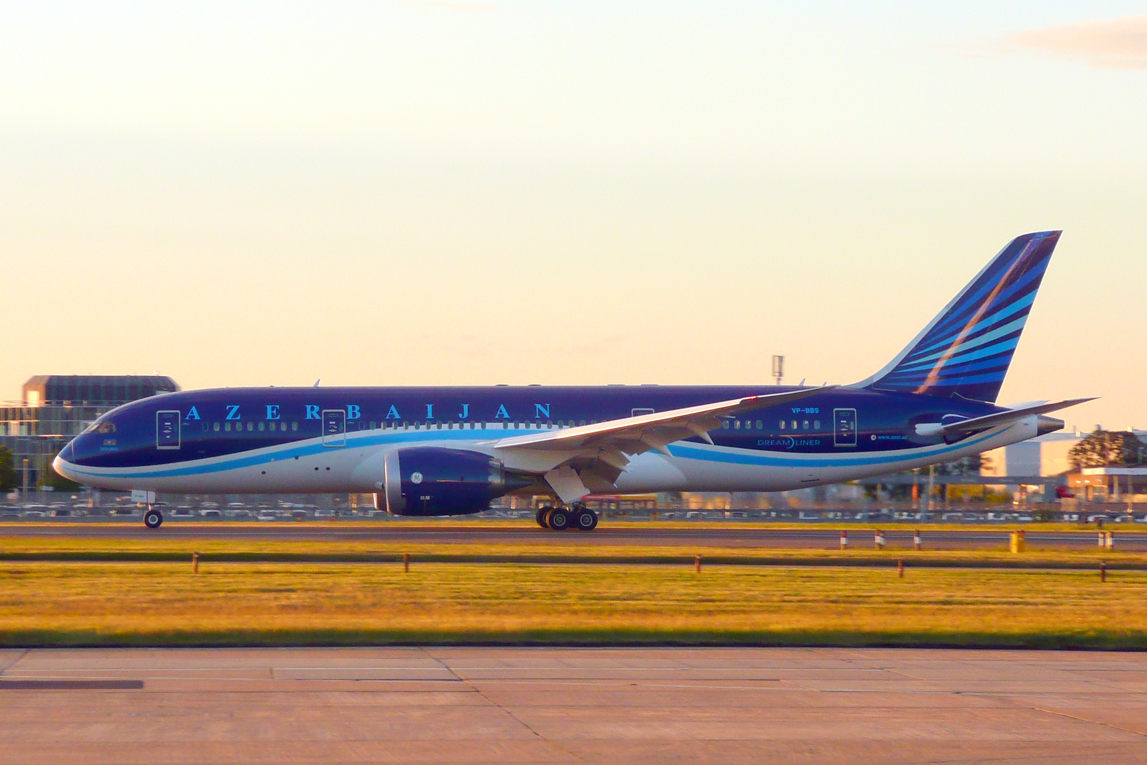 VP-BBS 29052015LHR